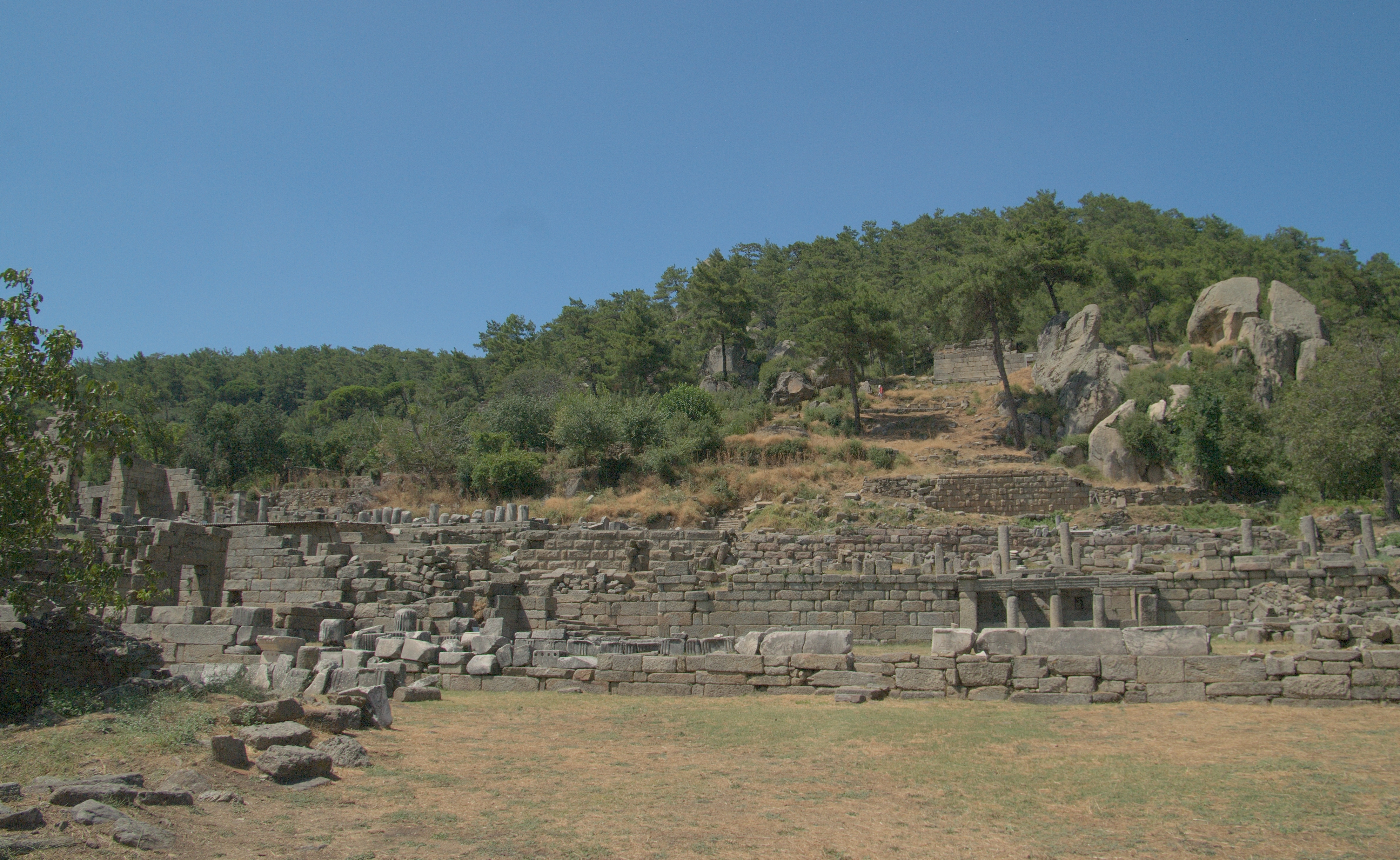 Лабранда. Терраса